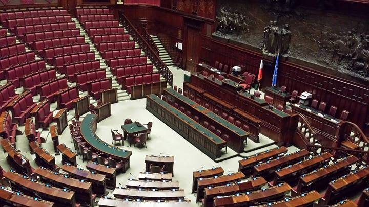 Veduta interna dell'aula della Camera dei Deputati italiana